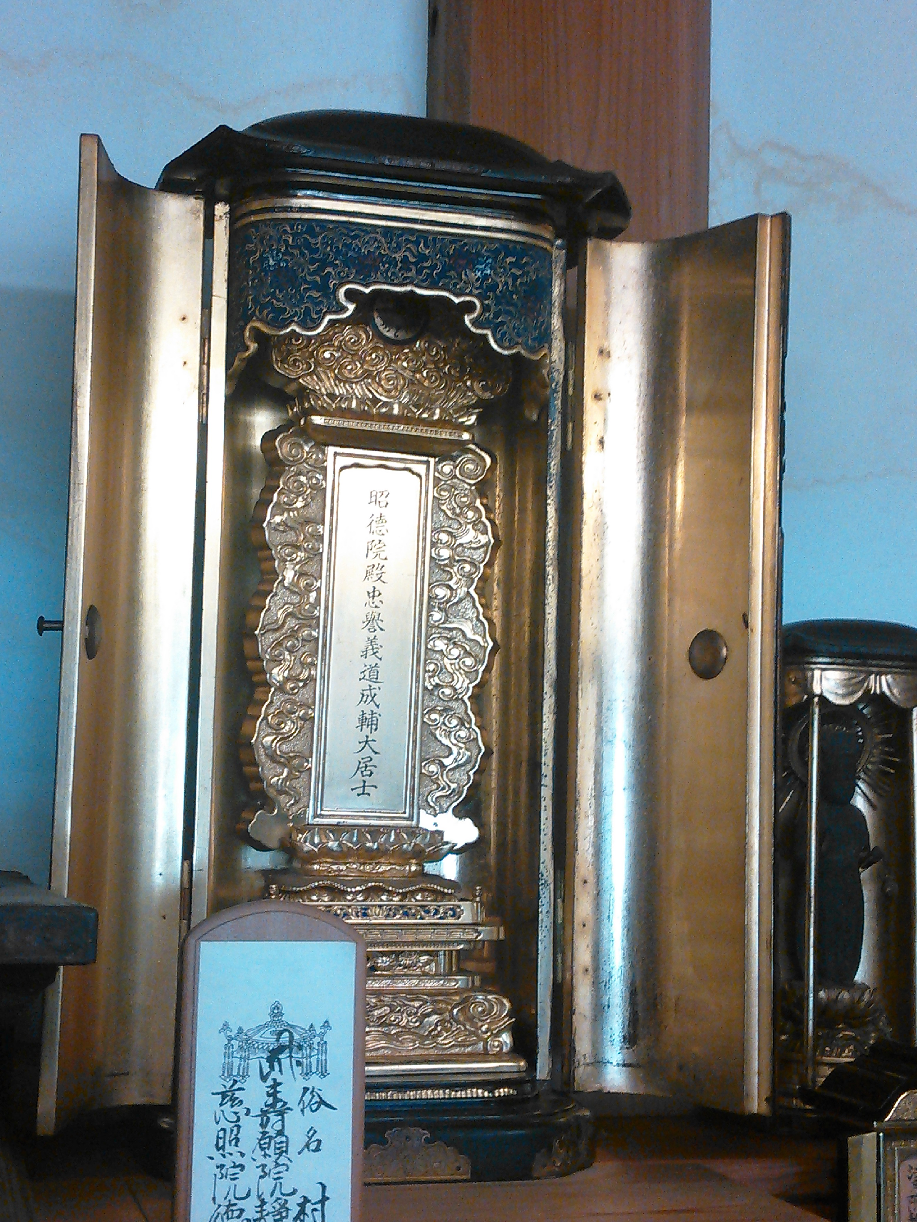 小田原市南町 報心寺 蔵